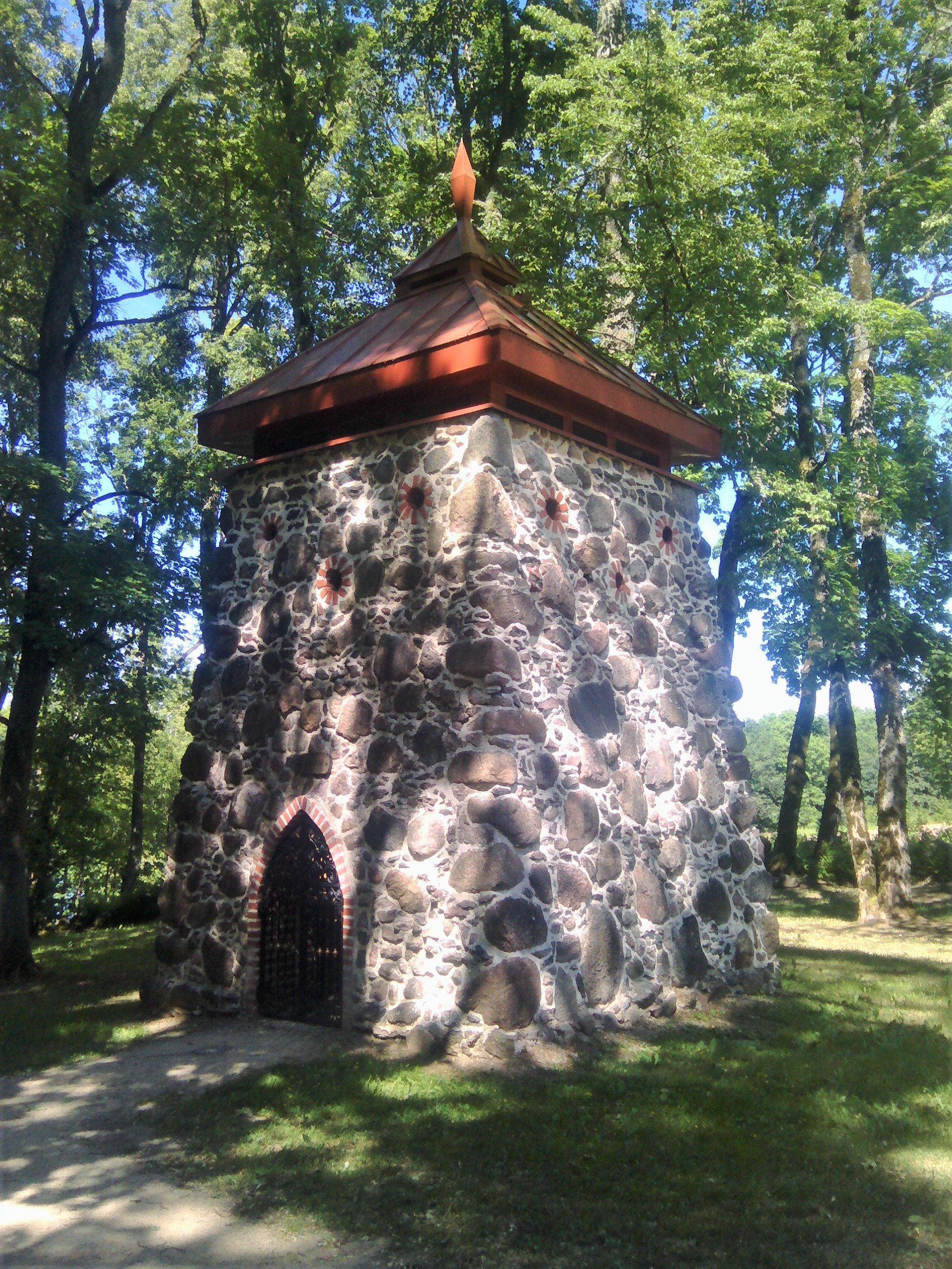 Ilzenbergo dvaro ansamblio statinys: rūkykla. Atstatyta 2013 m.